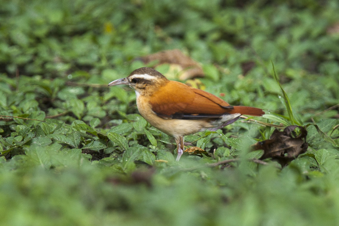 Furnarius leucopus tricolor Pale-legged Hornero - Manu NP_8607